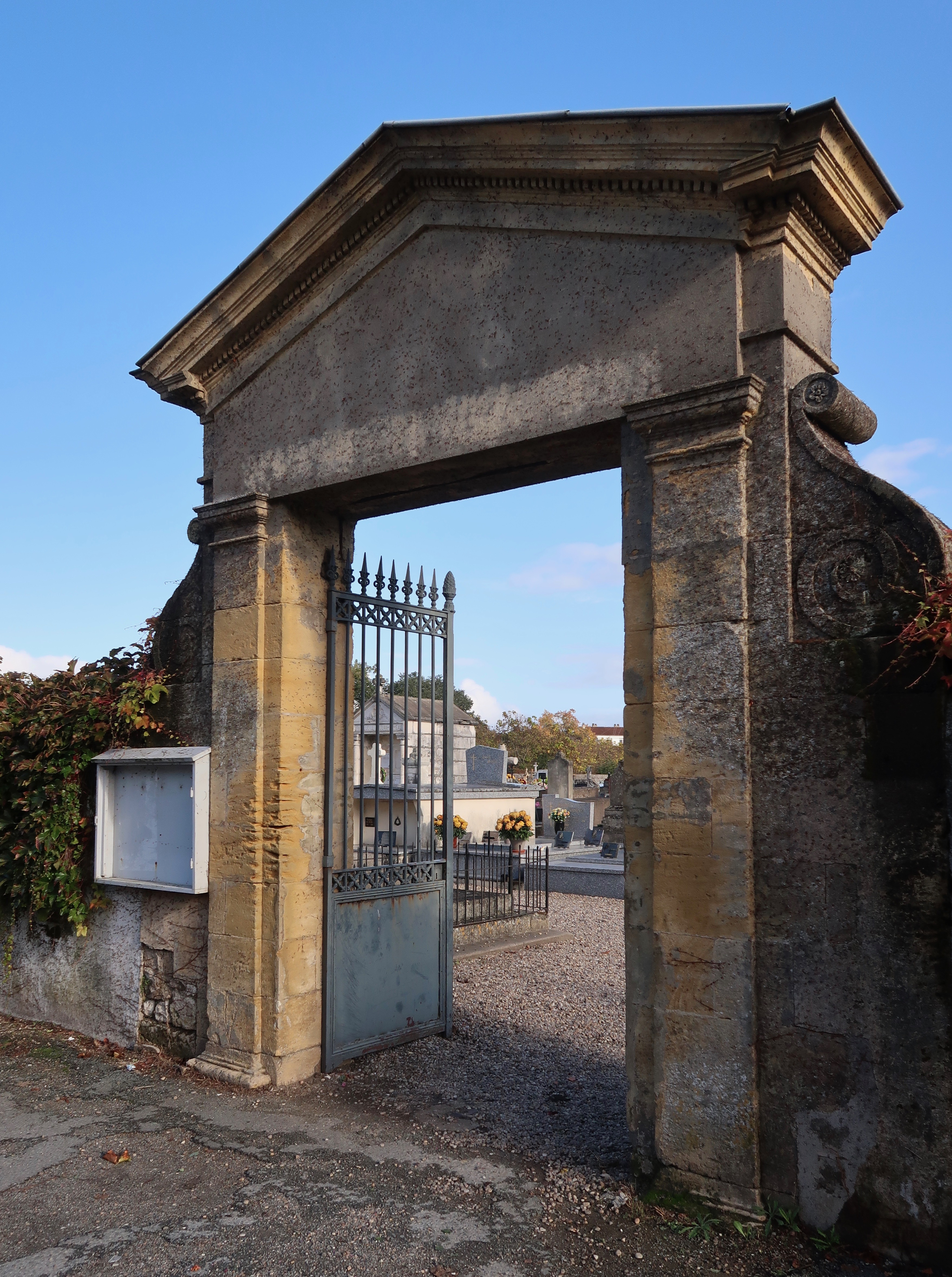 Entrée du cimetière de Sainte-Foy-la-Grande (Gironde).